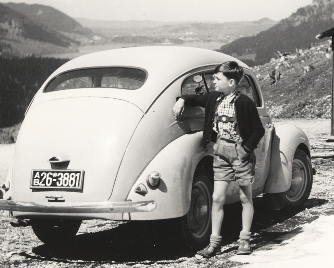 Unser Ford Taunus (1952)